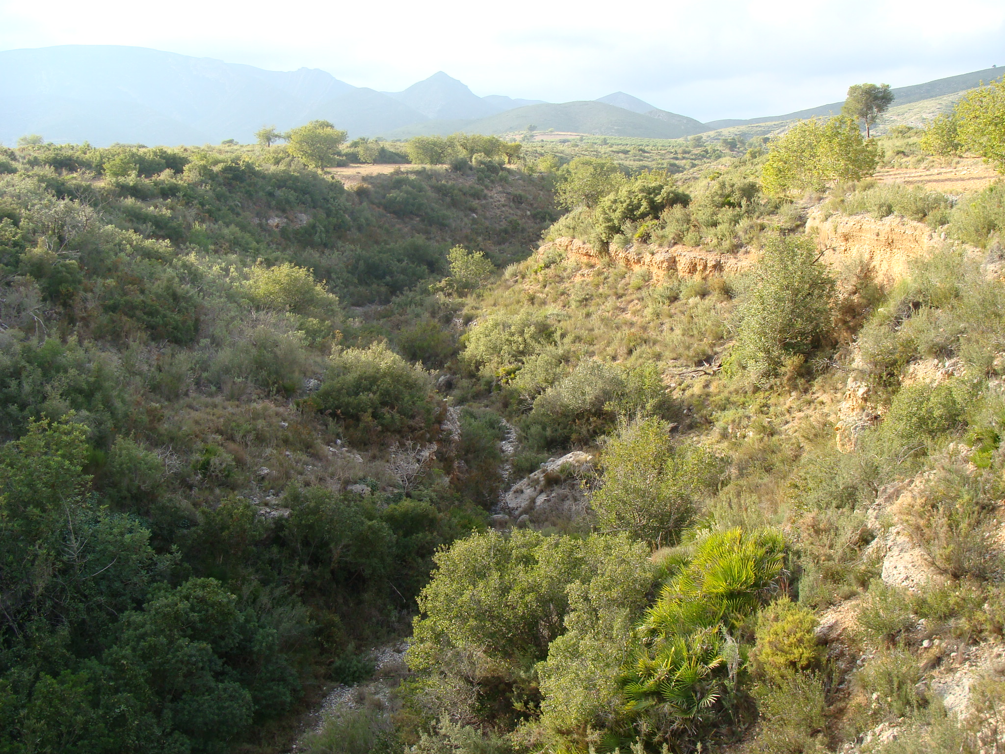 Rambla de La Colaita, que nace en la Sierra del Caballón, visible en la foto, y que se encuentra en la cuenca hidrográfica del río Magro, Valencia